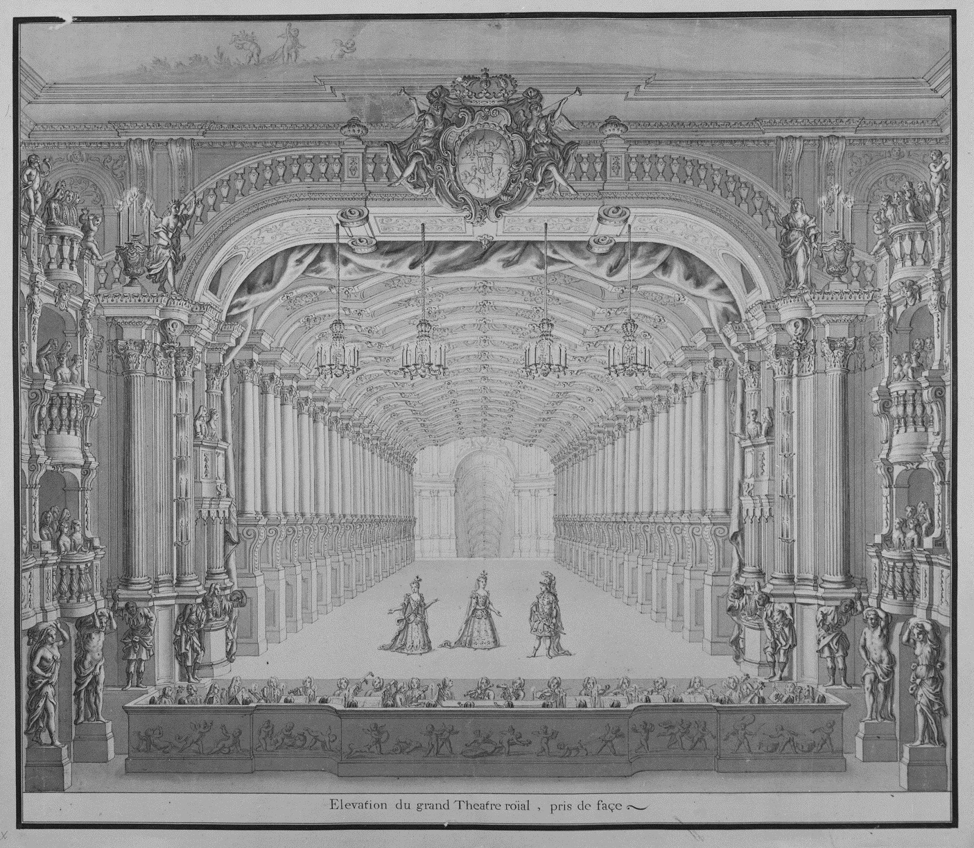 Opernhaus am Zwinger, Bühne und Orchester. Die Zeichnung zeigt die Aufführung der Oper "Teofane" von Pallavicini und Lotti anläßlich der Vermählung des Kurprinzen Friedrich August II. 1719. Staatliche Kunstsammlungen Dresden, Kupferstichkabinett, Inv.-Nr. Sax. top. Ca 200/13.